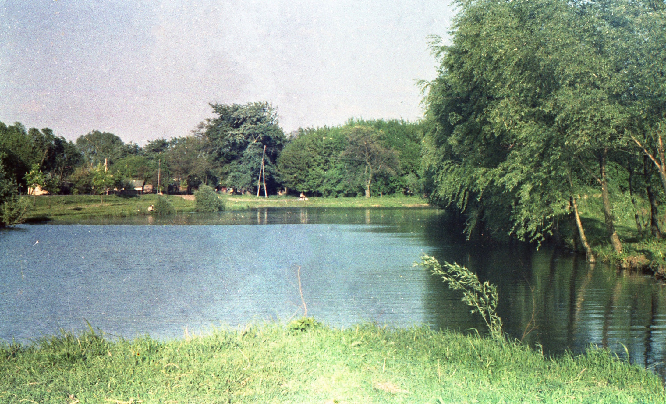 Ревня з заходу, 1970-і роки.